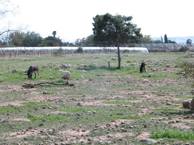 Fatzael Valley in the west side of Jordan Valley Views, Animals, flowers בקעת פצאל בבקעת הירדן בצידו המערבי. מראות מהבקעה, נוף, בעלי חיים וצמחיה